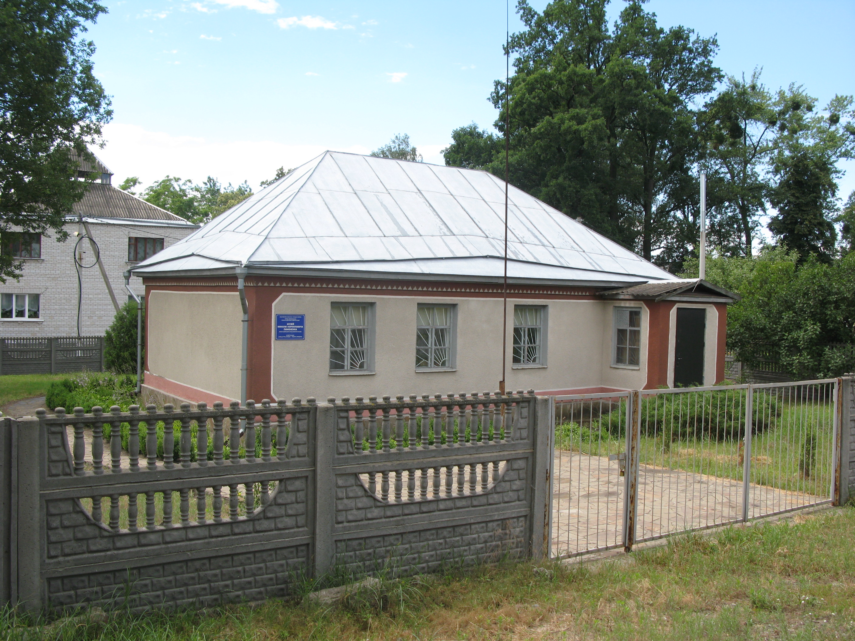 Будинок, в якому жив Пимоненко М.К., відомий художник, село Малютянка, вул. Лісова 61-а